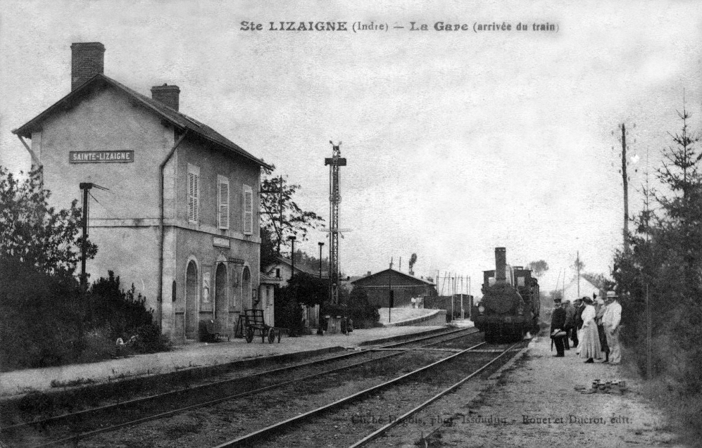 Intérieur de la gare vers 19090.